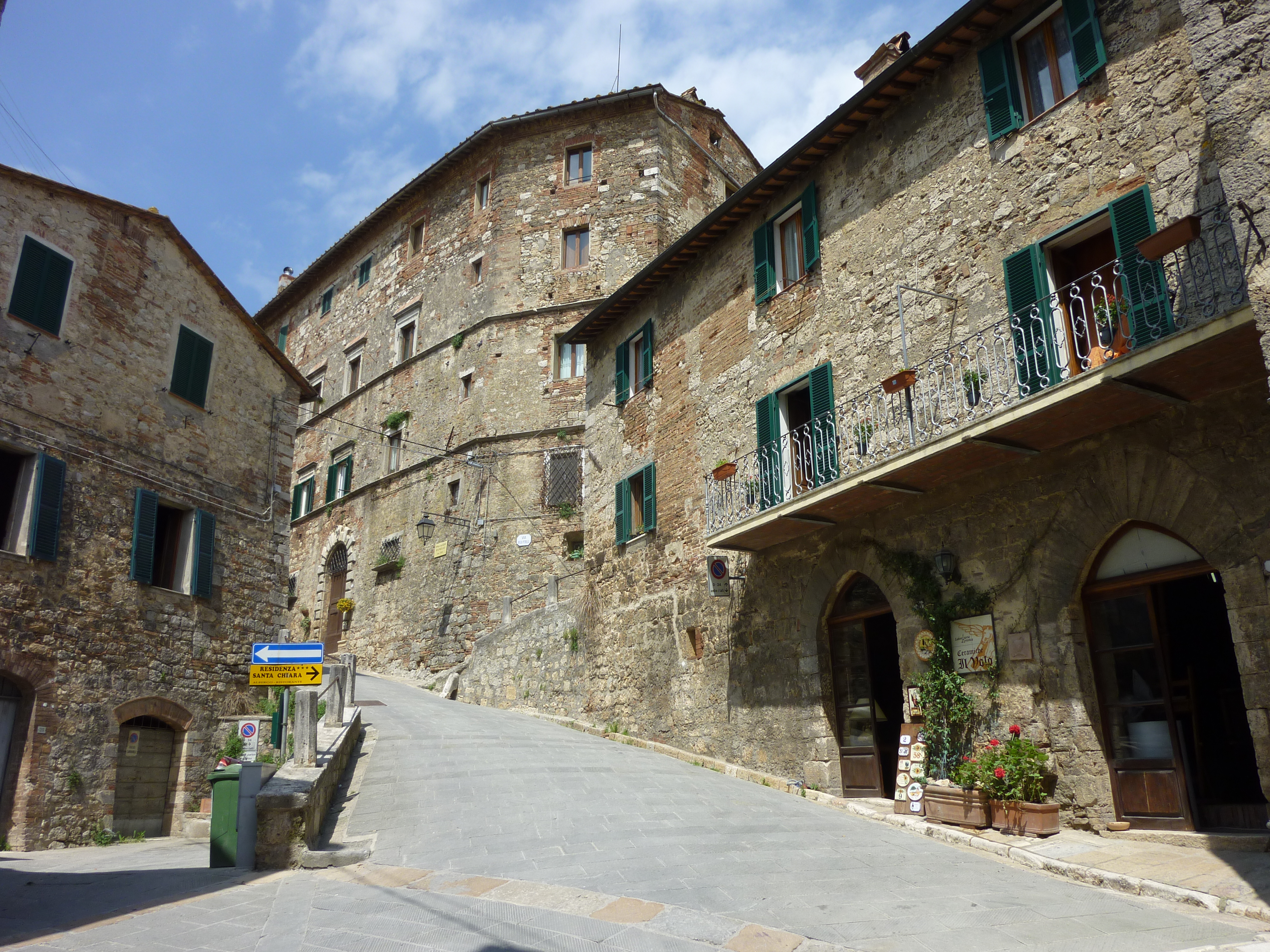 Sarteano